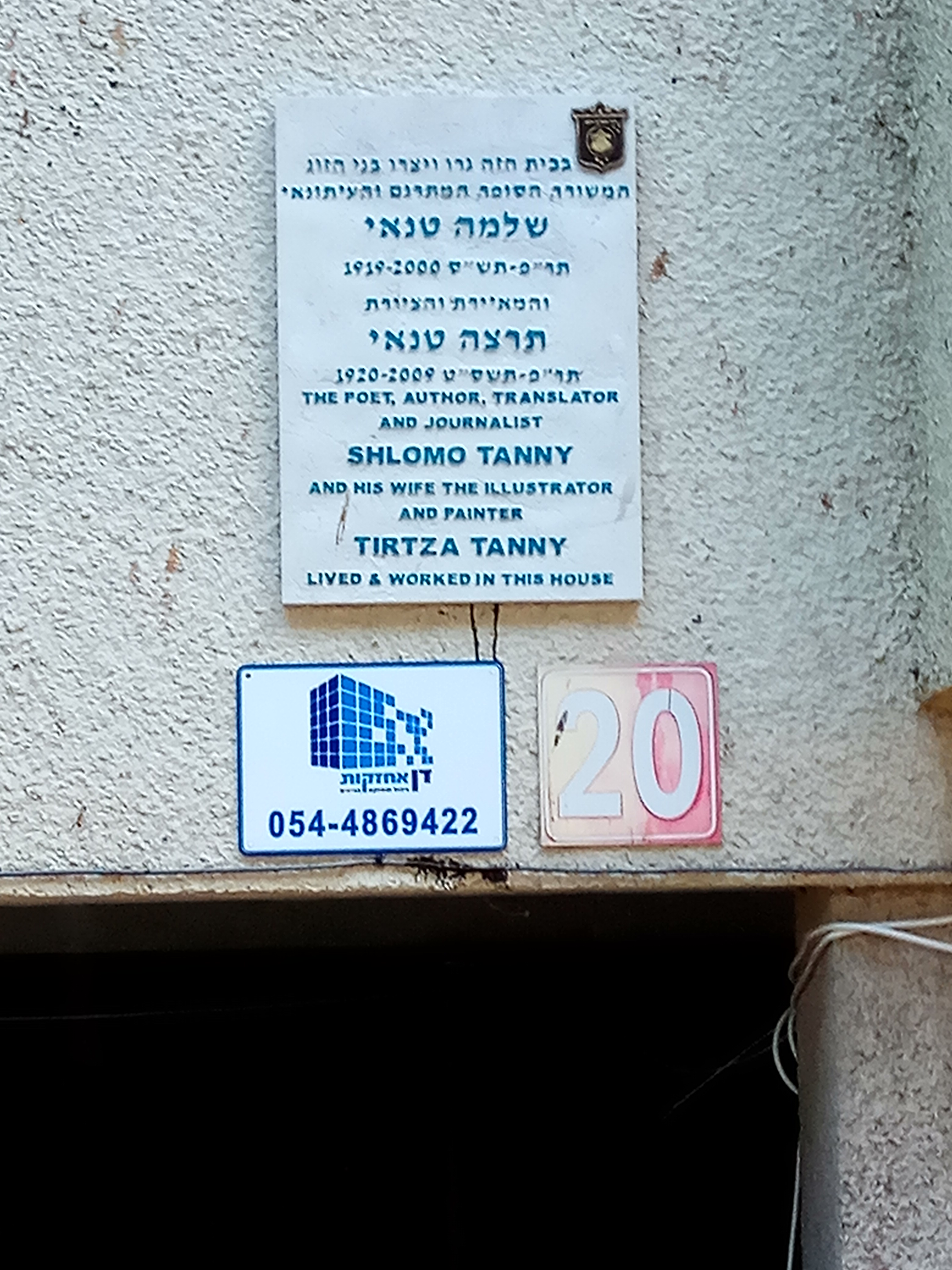 לוחית זיכרון לשלמה ותרצה טנאי ברחוב דפנה 20, תל אביב